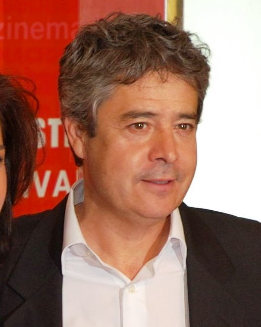 El actor y director de cine español Carlos Iglesias en el Festival Internacional de Cine de San Sebastián 2006